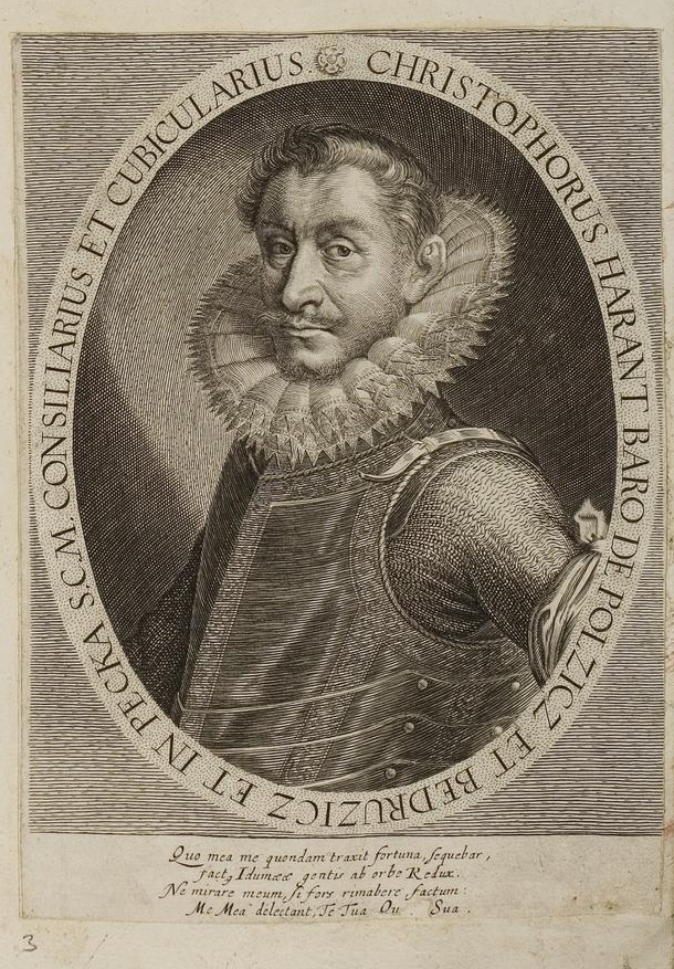 Grafik aus dem Klebeband Nr. 1 der Fürstlich Waldeckschen Hofbibliothek Arolsen Motiv: Christoph Harant von Polschitz und Weseritz